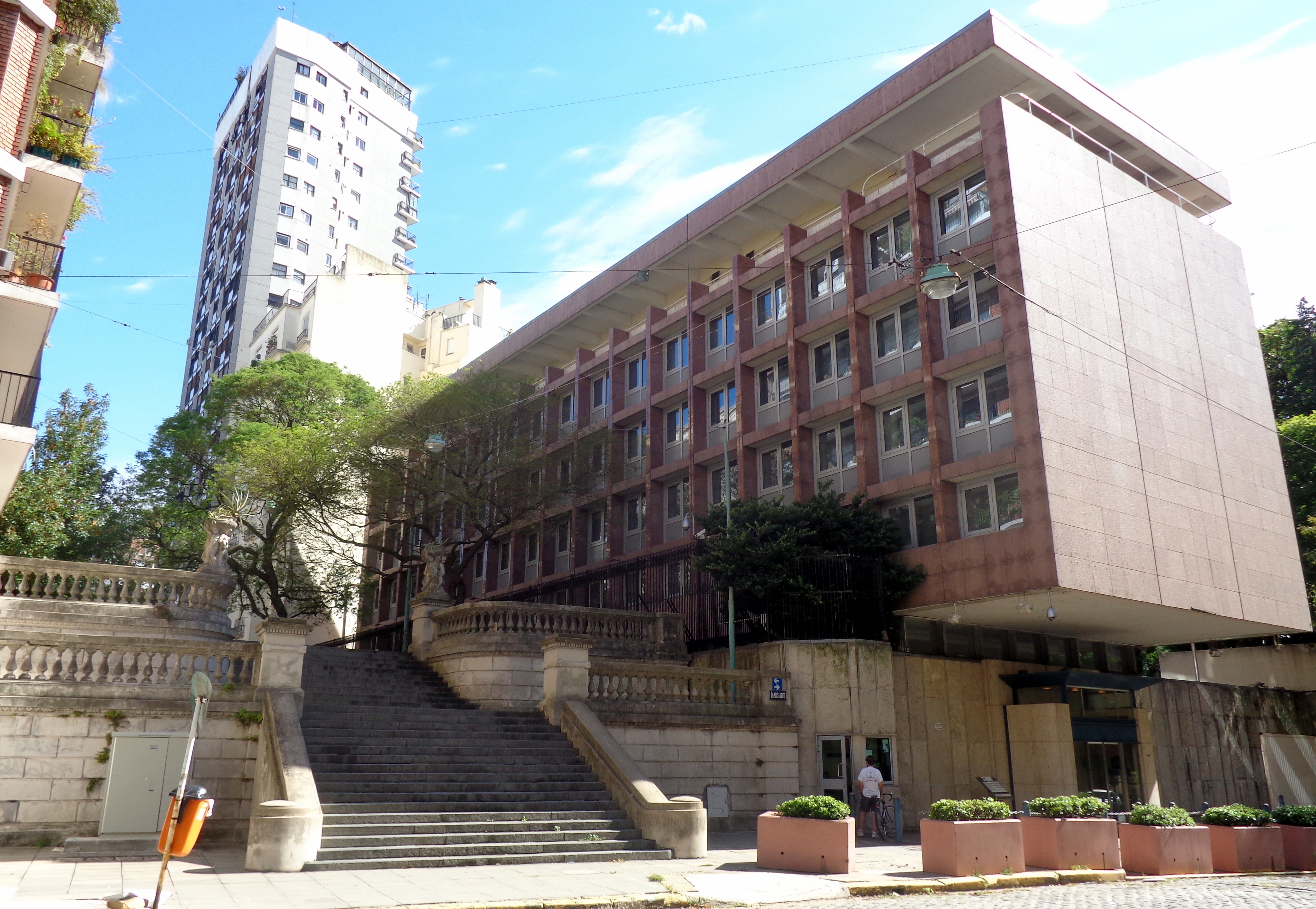 Escalera en "La Isla", barrio de Recoleta, en la esquina de la calle Guido y la calle Dr. Luis Agote. A la derecha: La embajada del Reino Unido de Gran Bretaña en Buenos Aires, Argentina.